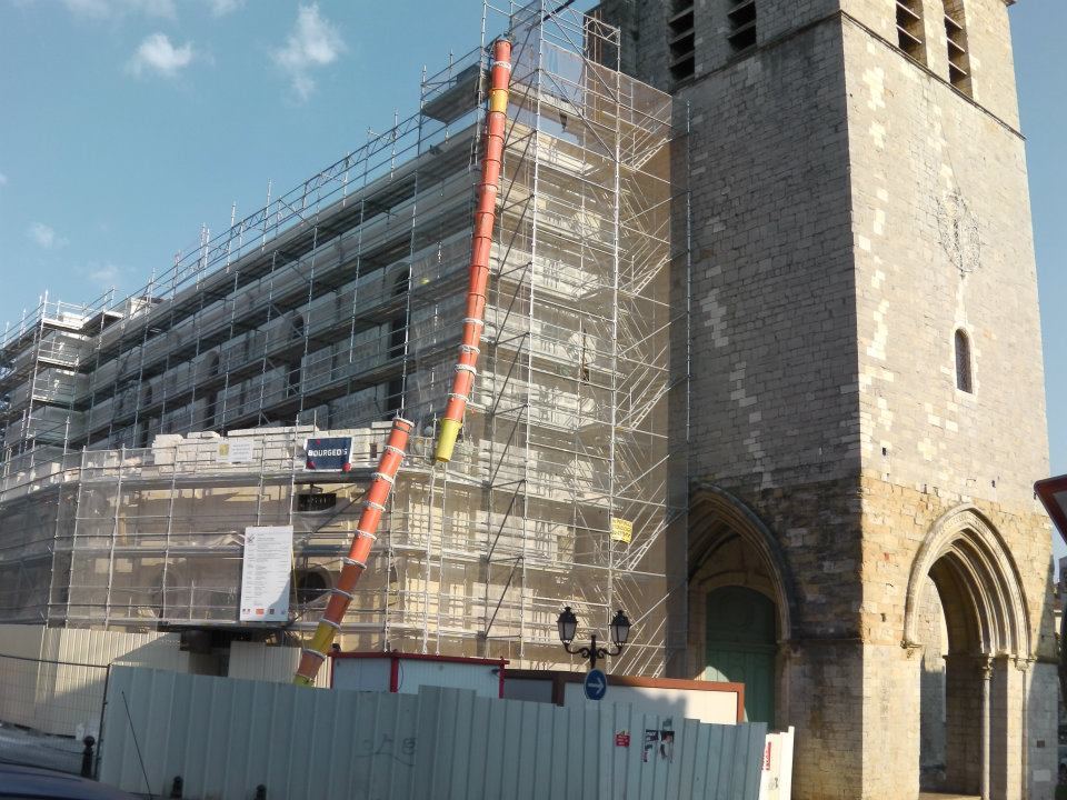 La cathédrale d'Alès (Gard), lors des travaux de restauration extérieurs